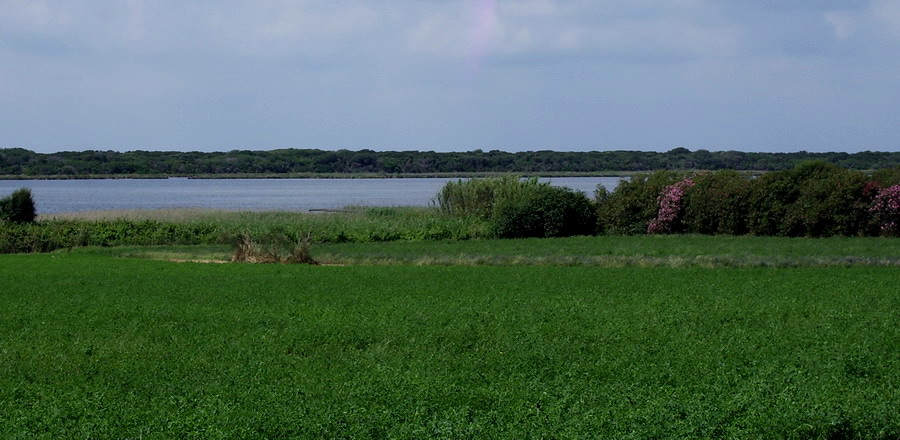 Parziale veduta del Lago di Burano a Capalbio (GR)